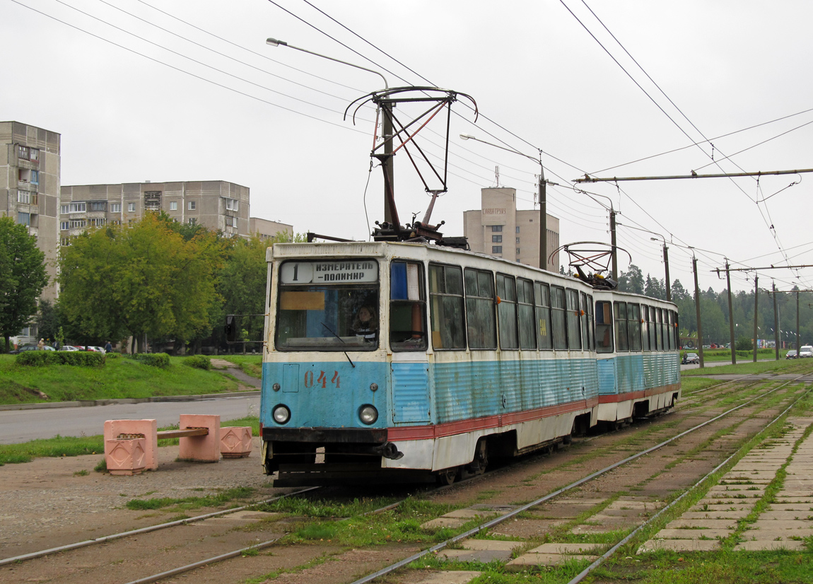 Новополоцк 71-605 СМЕ 044+042